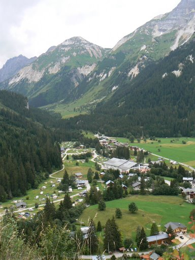 Pralognan la Vanoise (France's village in Alpes)